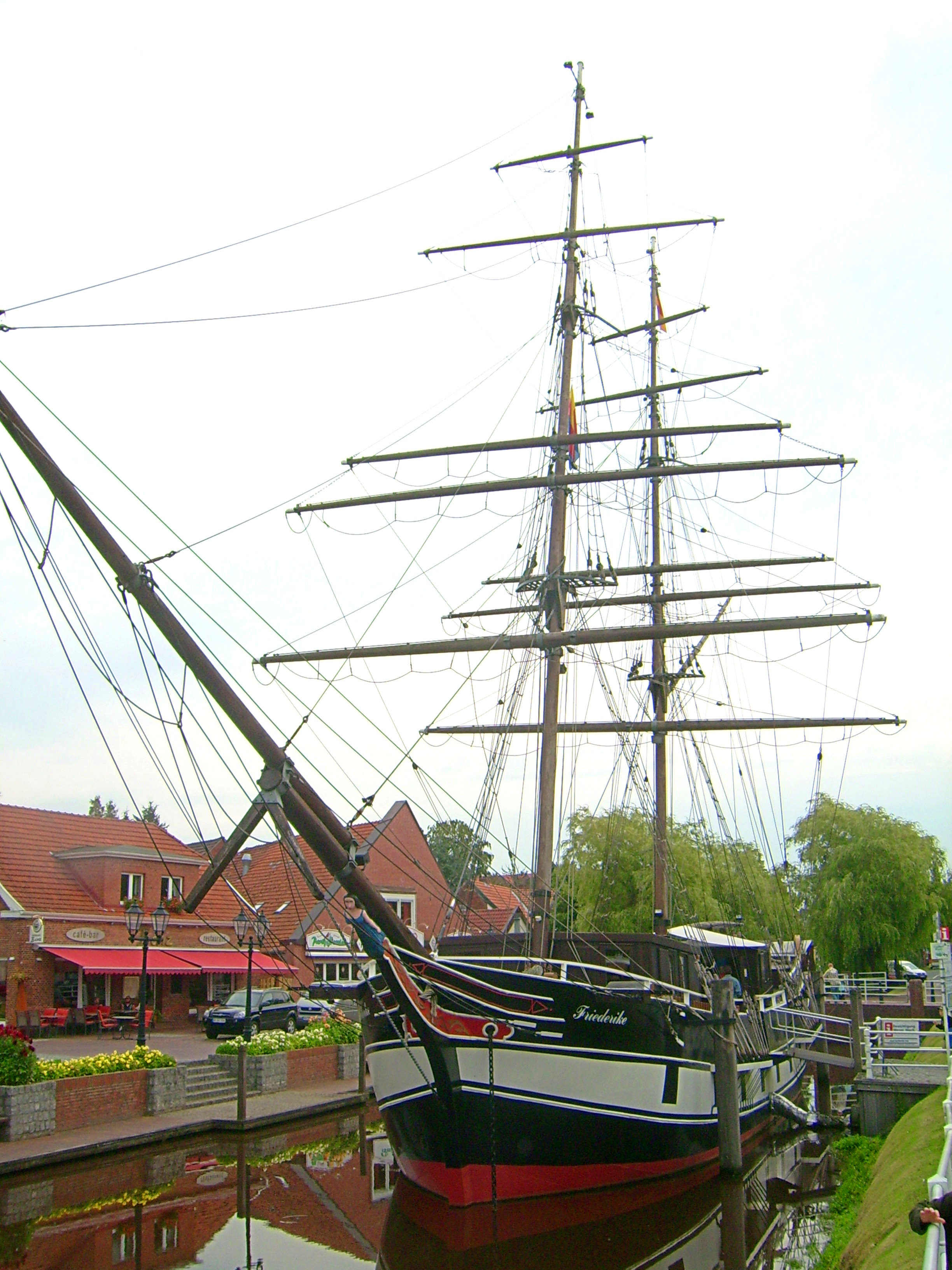 Touristeninformation auf der Friederike von Papenburg in Papenburg